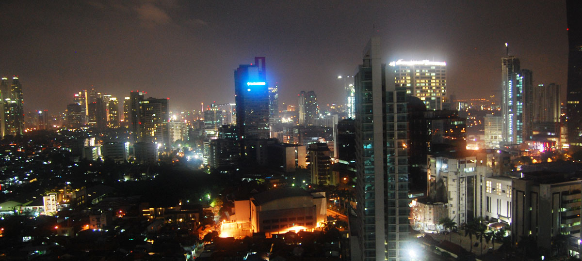 Kuningan di malam hari